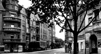 Guben (Gubin): Grüne Wiese am Abzweig Haagstraße: Haus am rechten Bildrand: Grüne Wiese 5 bzw. 52 (Fotoatelier Rosenthal), Aufnahme von 1911.